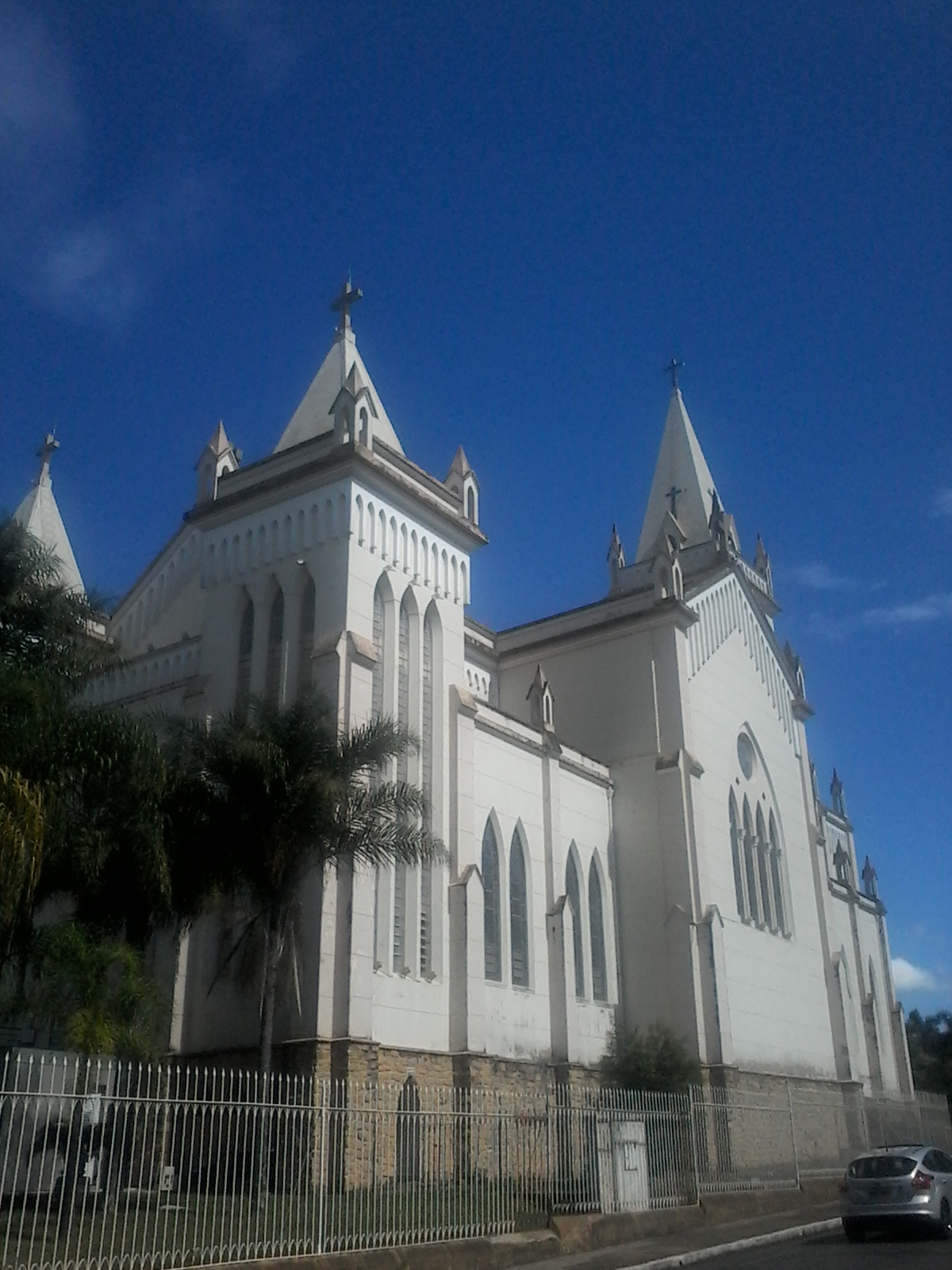 Vista lateral da Catedral de Santo Antônio, em Patos de Minas